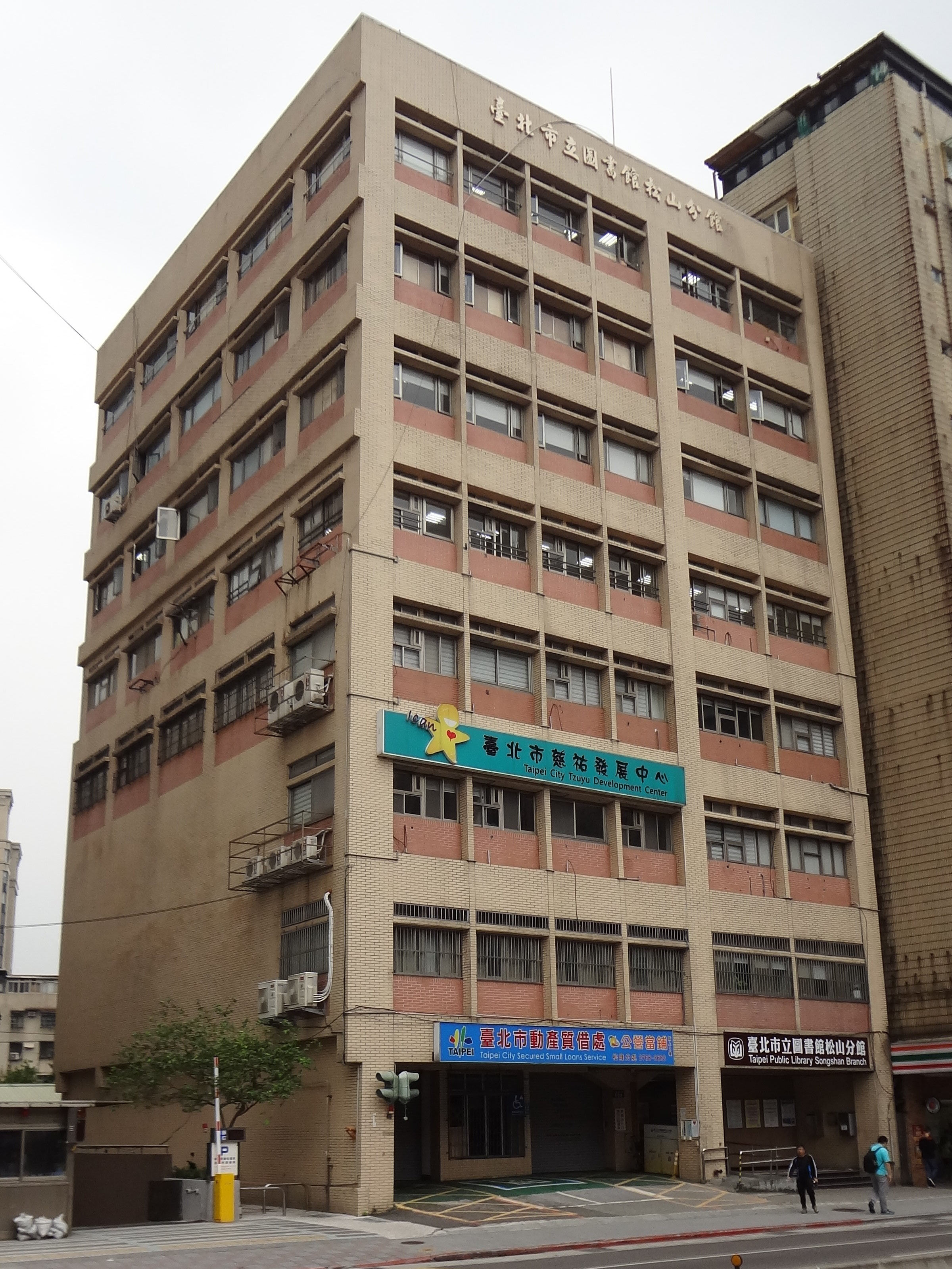 臺北市立圖書館松山分館，位於臺北市松山區八德路四段688號5至8樓。臺北市動產質借處松隆分處位於2樓，臺北市慈祐發展中心位於3至4樓。